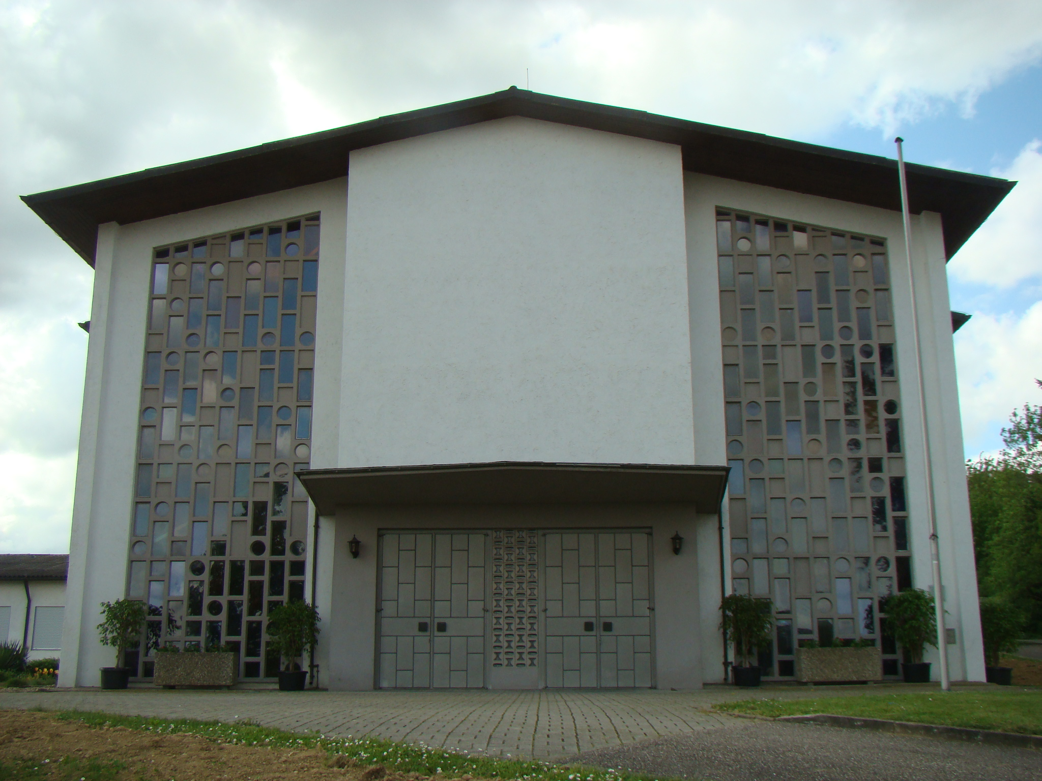 Eppingen-Richen, kath. Kirche Mariä Geburt